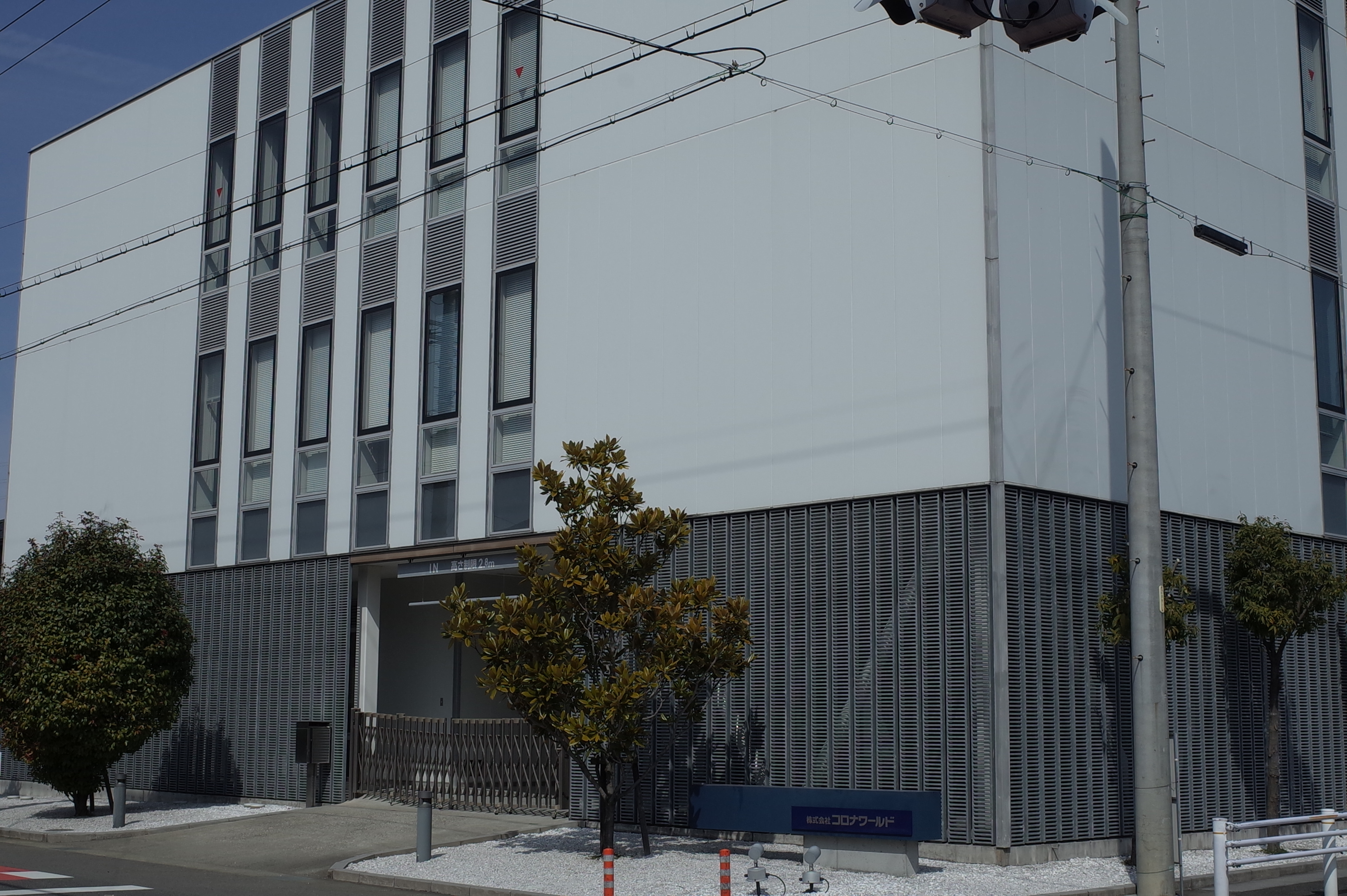 愛知県小牧市にあるコロナワールド本社